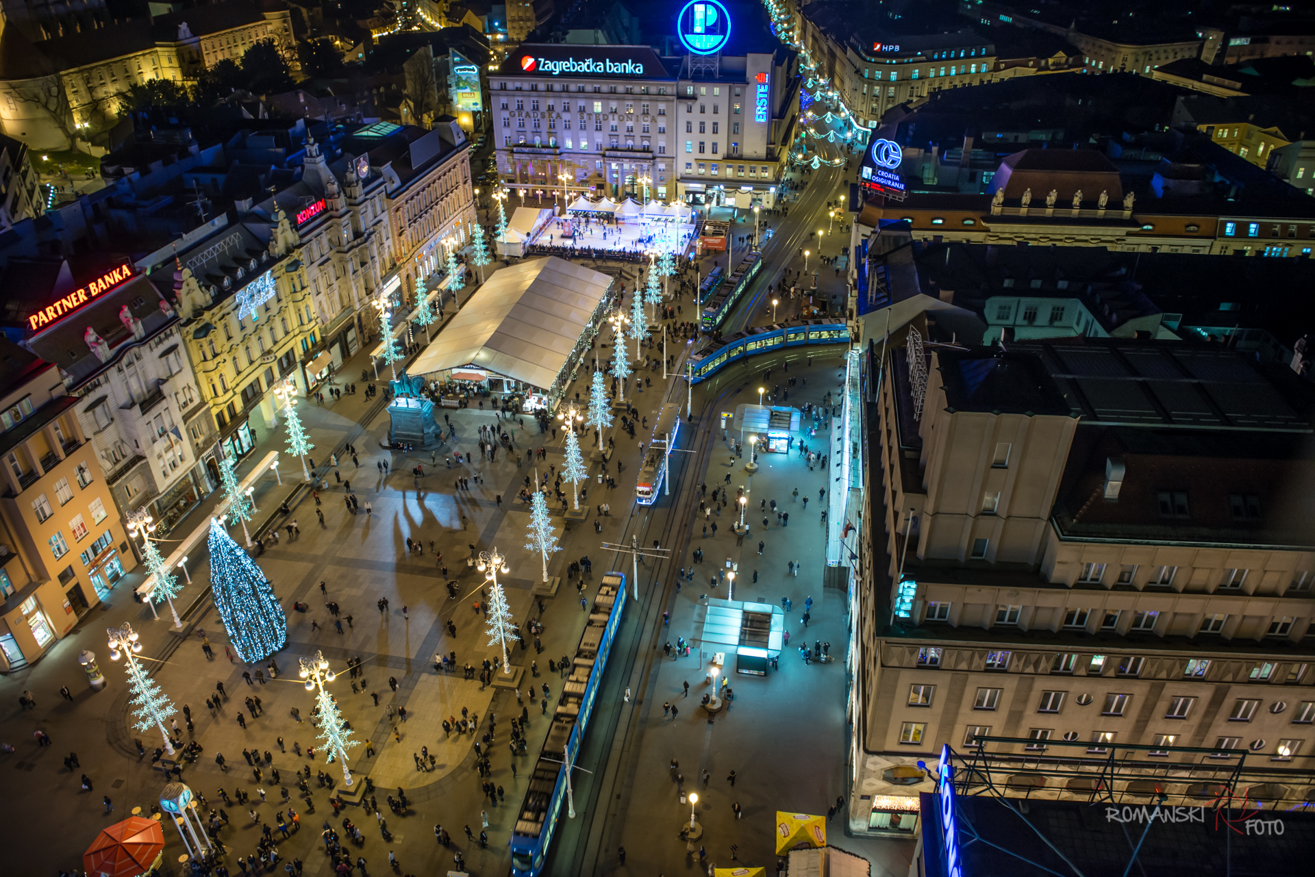 Zagreb 2014